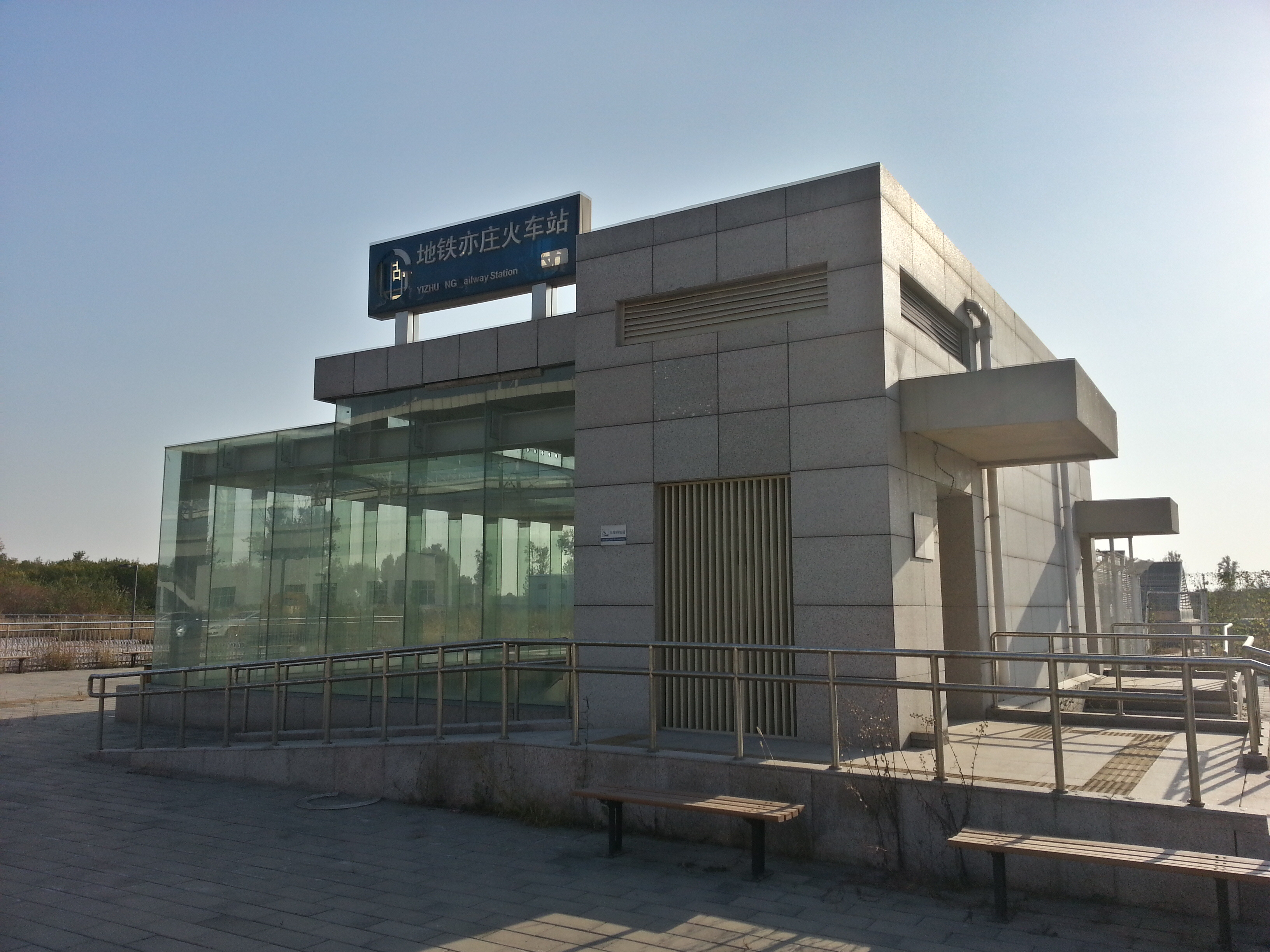 亦庄火车站（亦庄线）A口